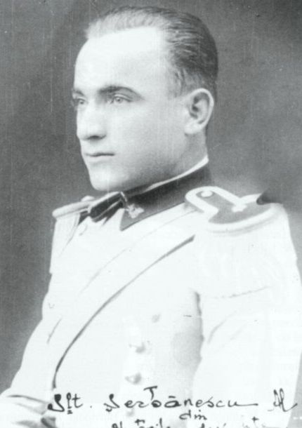 Slt. Alexandru Șerbănescu în ținută de gală a vânătorilor de munte.